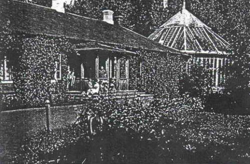 Беларуская (тарашкевіца): Сітцы (Sitcy), сядзіба Дамейкаў (Damiejka)